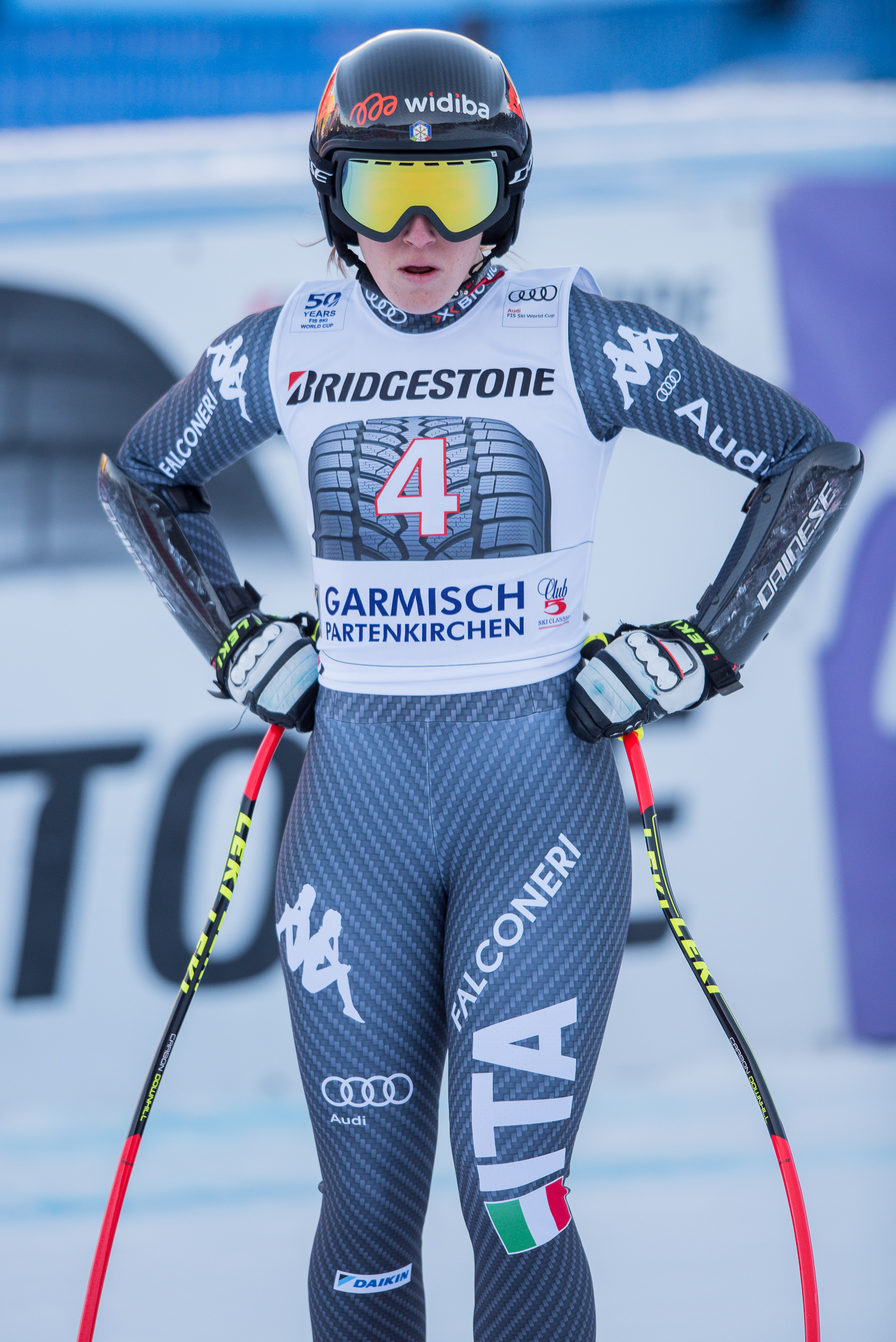 64. Kandahar Rennen,Audi FIS Ski Weltcup Garmisch-Partenkirchen,Damen Super-G,Kandahar,Ladies Super-G,Sofia Goggia